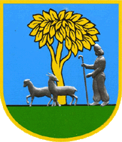 Герб Ясіня